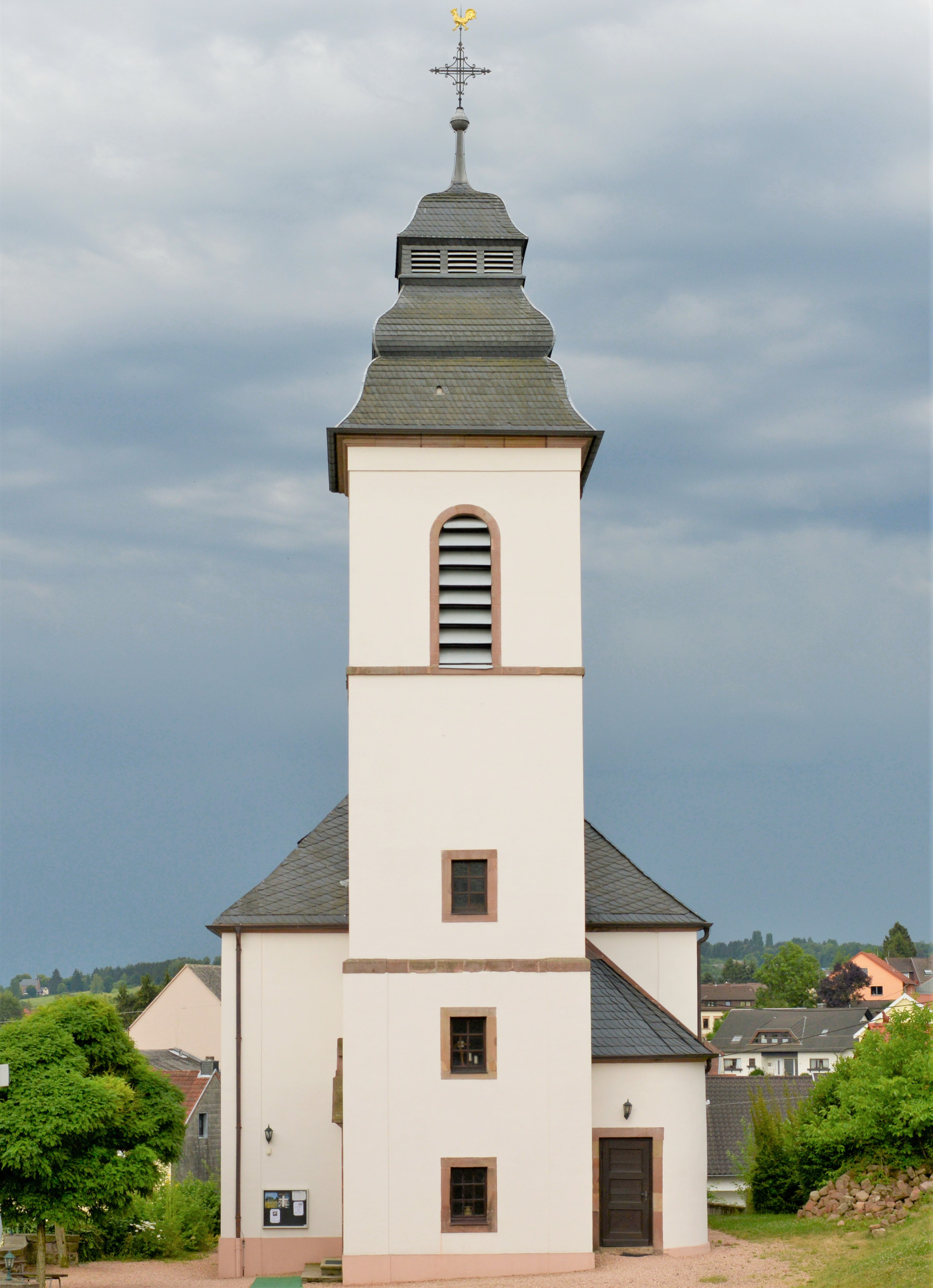 Evangelische Kirche in Uchtelfangen (Ortsteil von Illingen, Saarland), Friedrichstraße 9 (2018).